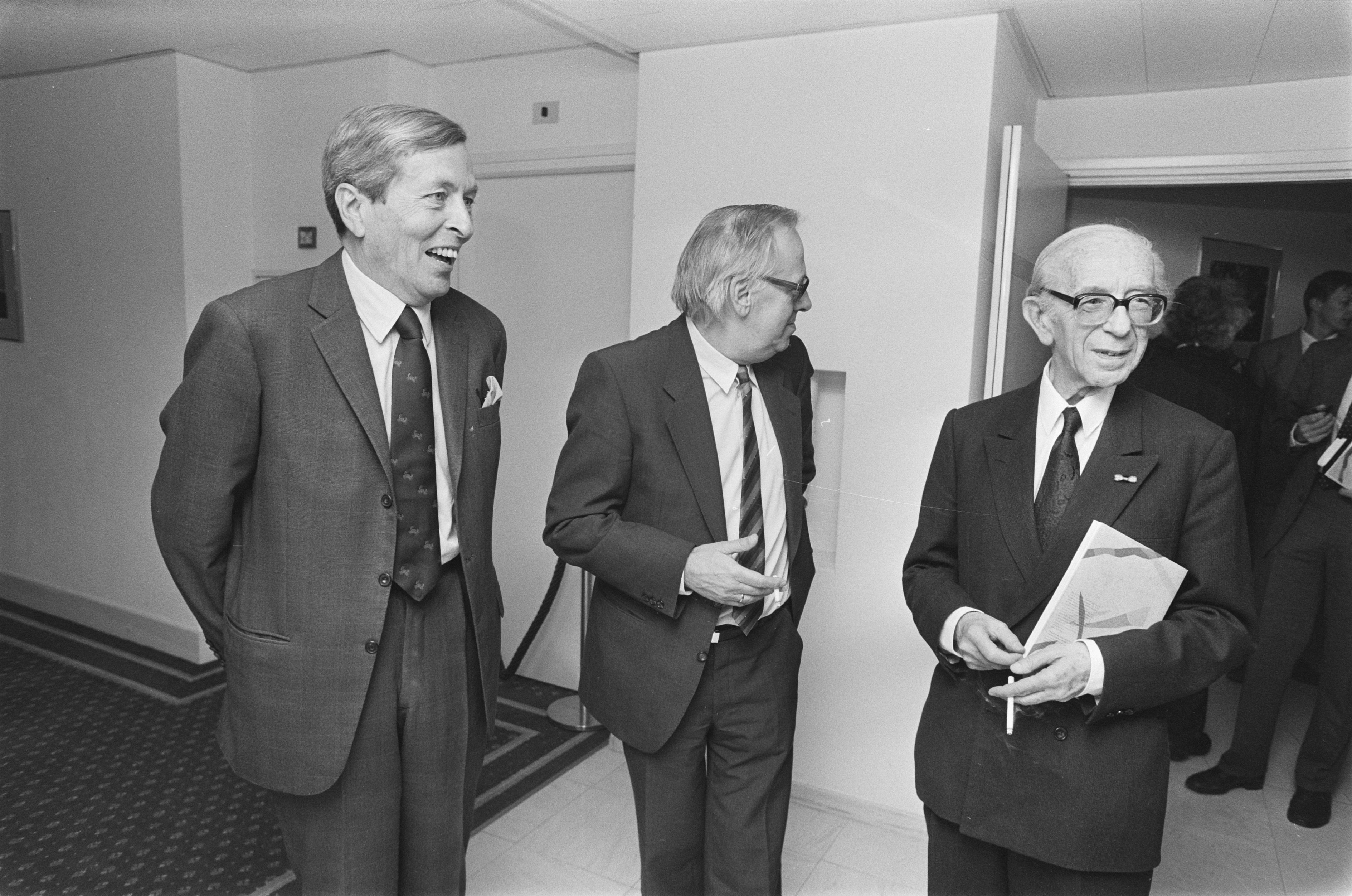 Collectie / Archief : Fotocollectie Anefo Reportage / Serie : [ onbekend ] Beschrijving : Prins Claus en Jan Blokker tijdens overhandiging Holland-festival jubileumboek aan Peter Diamand, directeur Holland-Festival, in Amsterdam Datum : 6 mei 1987 Locatie : Amsterdam, Noord-Holland Trefwoorden : boeken, koninklijk huis, prinsen Persoonsnaam : Blokker Jan, Claus, prins, Diamand Peter Fotograaf : Bogaerts, Rob / Anefo Auteursrechthebbende : Nationaal Archief Materiaalsoort : Negatief (zwart/wit) Nummer archiefinventaris : bekijk toegang 2.24.01.05 Bestanddeelnummer : 933-9718